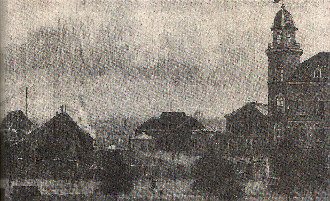 Düsseldorf, Friedrichstraße, 19. Jahrhundert. Bildunterschrift: Das Tor zur Friedrichstraße im 19. Jahrhundert: Von Norden aus gesehen, rechts das Hotel „Europäischer Hof“, daneben und dahinter die Gebäude des Köln-Mindener Bahnhofs; direkt neben dem Hotel ist dort, wo heute das Hochhaus der LVA Rheinprovinz steht, das Stationsgebäude mit dem benachbarten Lokschuppen zu sehen; vorn links ein Güterschuppen.